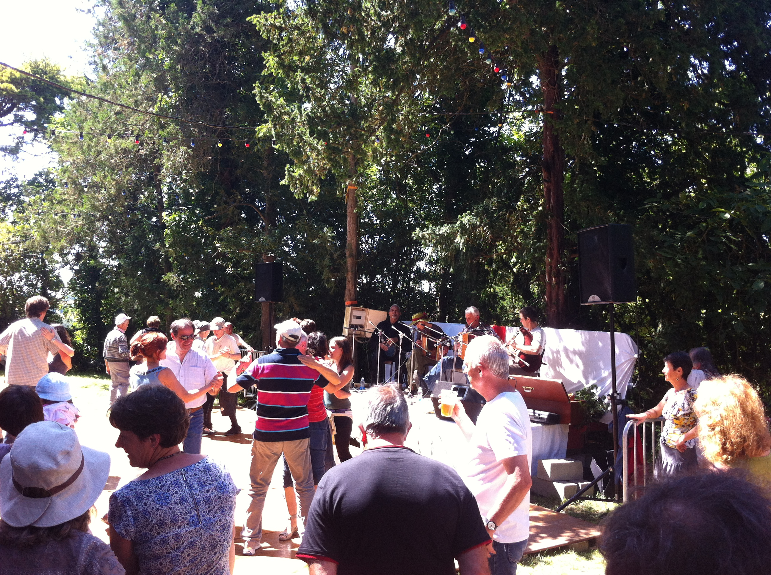 Danses occitanes lors du Rondèu de Castelnau-Barbarens (Gers)